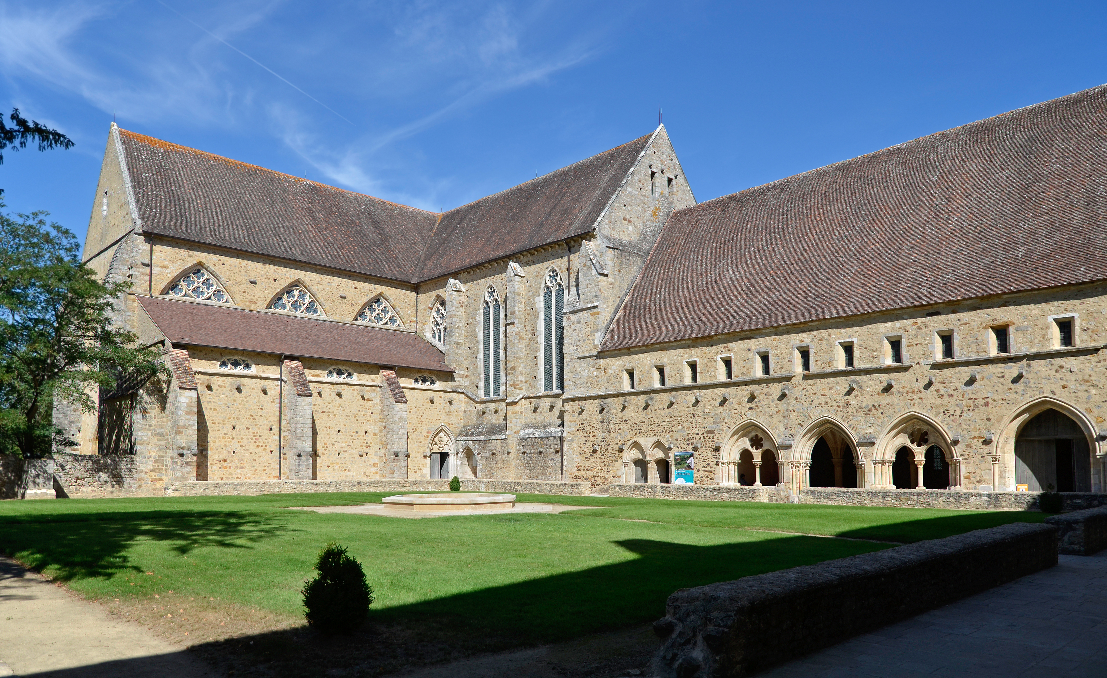 Abbaye de l'Épau - Yvré-l'Évêque, Sarthe .